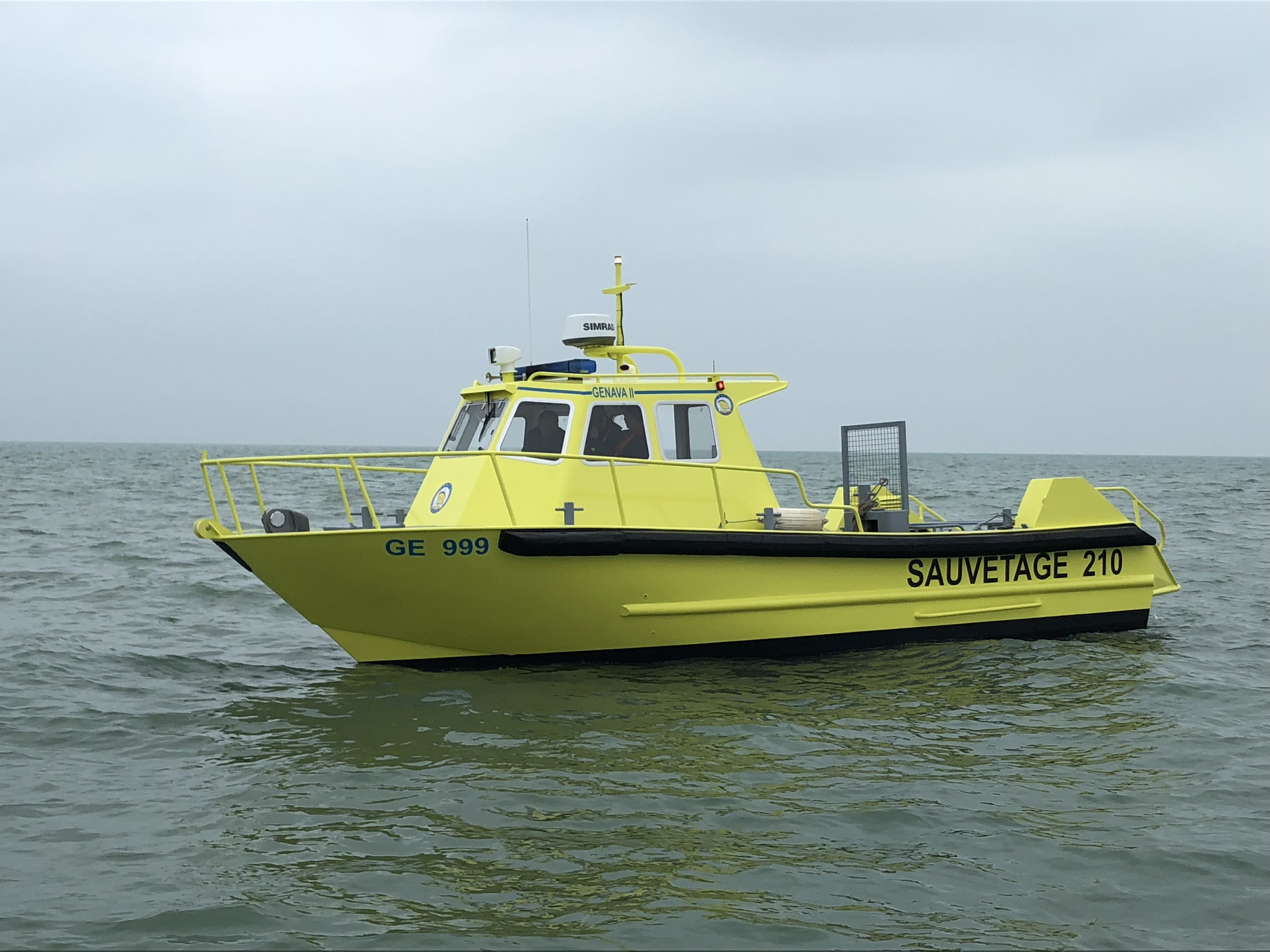 Le Lemano 210, entièrement rénové, durant ses essais en mer en Normandie en avril 2017.